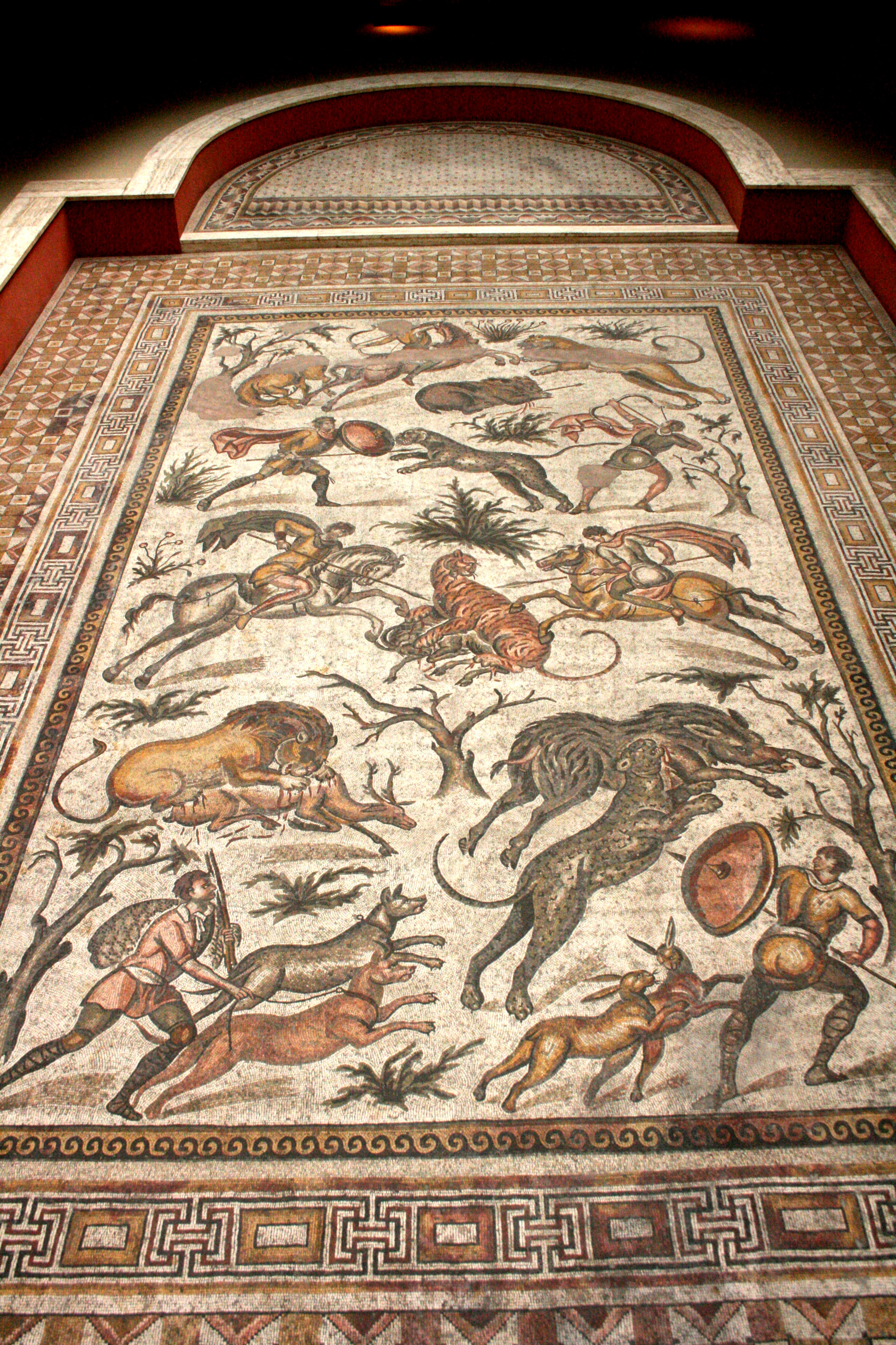 Mosaïque romaine de la Chasse (début du Ve siècle), provenant du palais du gouverneur de la province de Syria Secunda à Apamée (Syrie). Musée du Cinquantenaire, Bruxelles (Belgique)